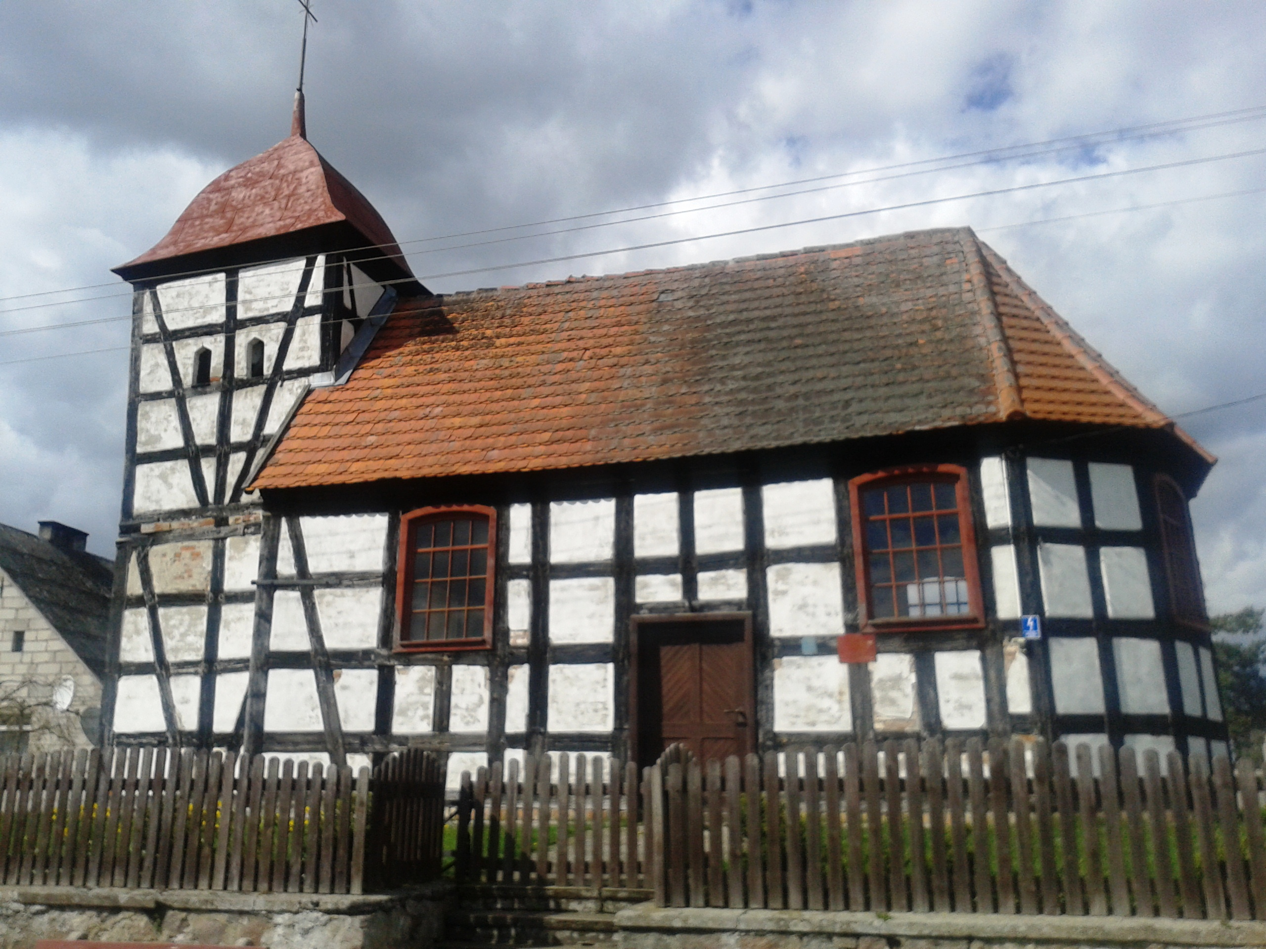 Trzebawie - dawny kościół ewangelicki, obecnie rzymskokatolicki filialny p.w. św. Michała Archanioła, 2 poł. XVIII